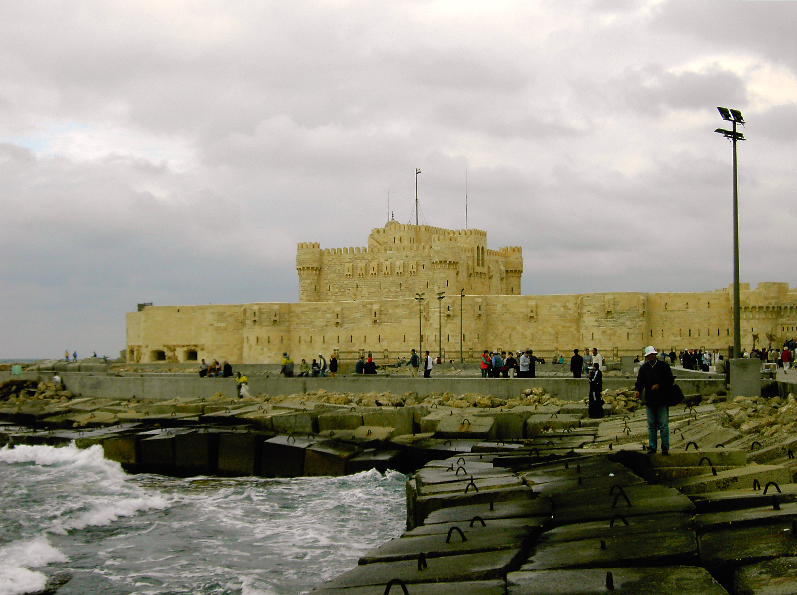 photo personnelle de Fort Qaytbay